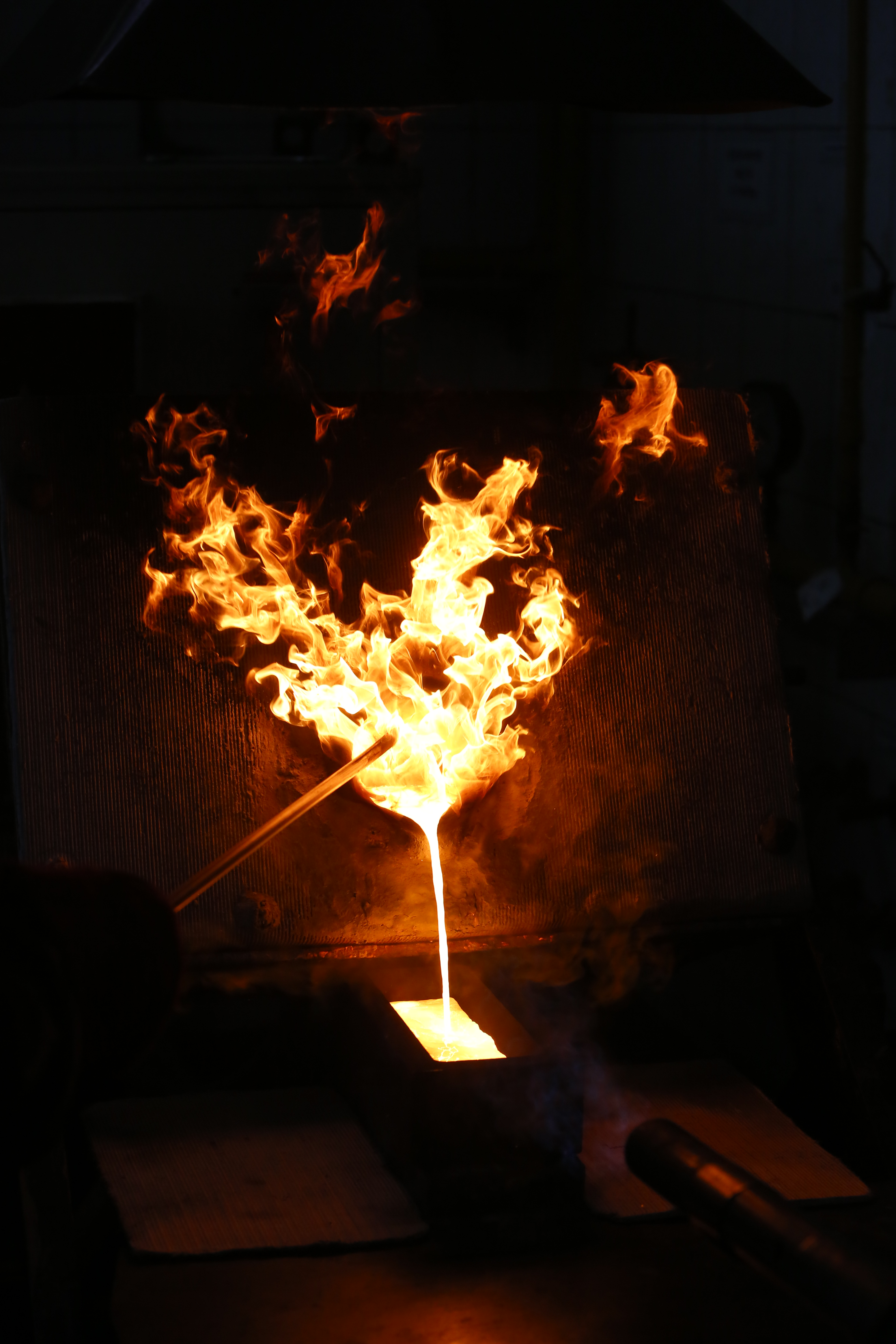 Вики-экспедиция "Медная столица России", день первый. Химико-металлургический цех. Розлив золота, чистота содержания 99,9.